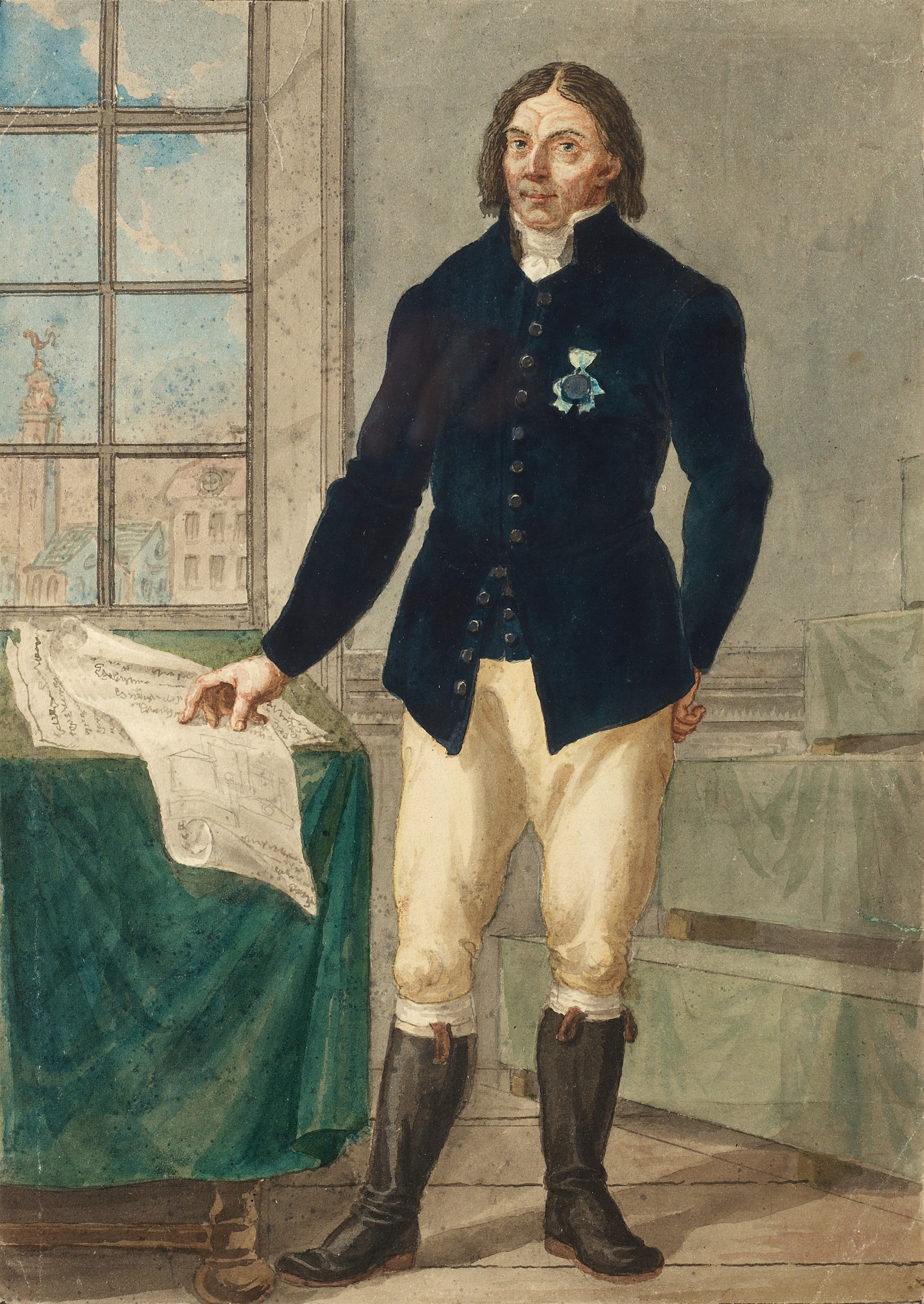 Den svenske riksdagsmannen Tuve Larsson (1765-1836). Avporträtterad av Carl Wilhelm Svedman. Målningen visar Larsson troligen under 1810 vid tiden för riksdagen i Örebro. Ritningarna Tuve Larsson ses peka på avser troligtvis byggnationer som regelbundet ägde rum i hans hembygd i Osby socken i Skåne.